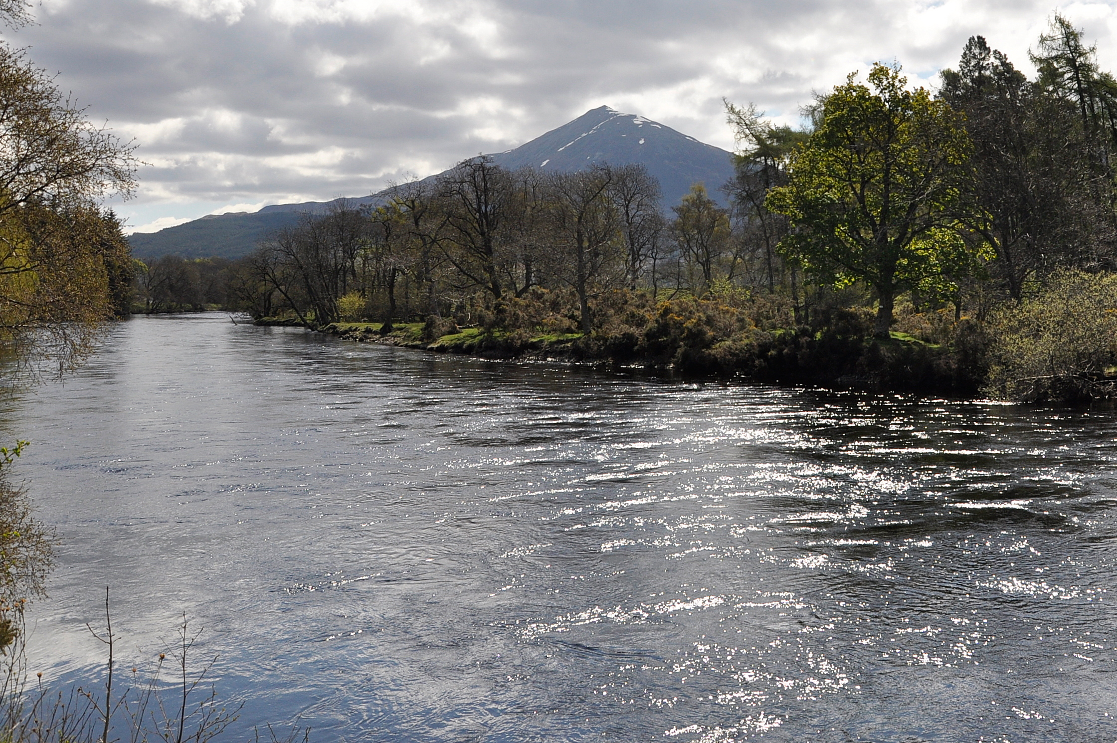 De Tummel en de Schiehallion in de achtergrond, vlak bij Kinloch Rannoch in Schotland